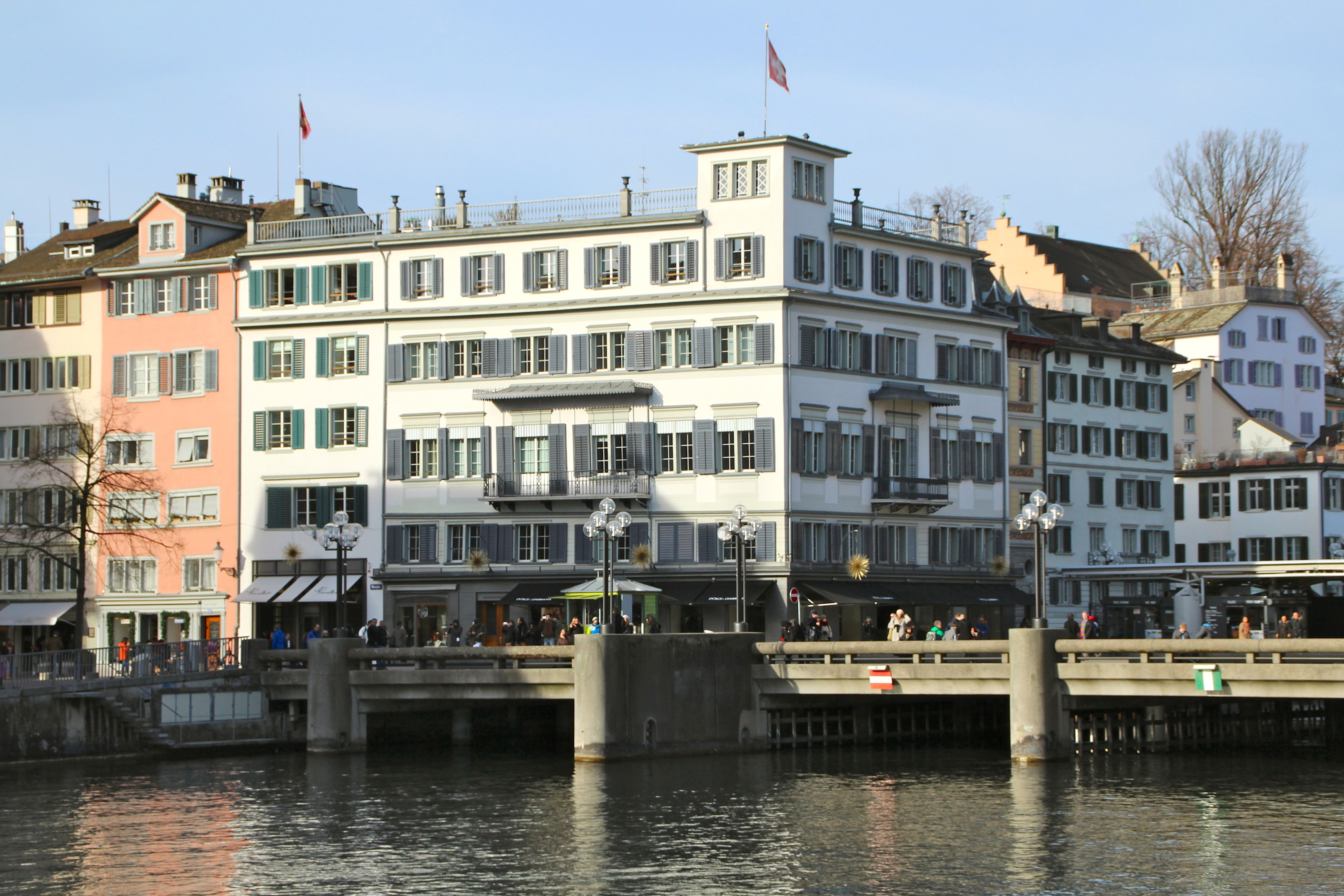 Haus zum Schwert (Zürich) Südseite